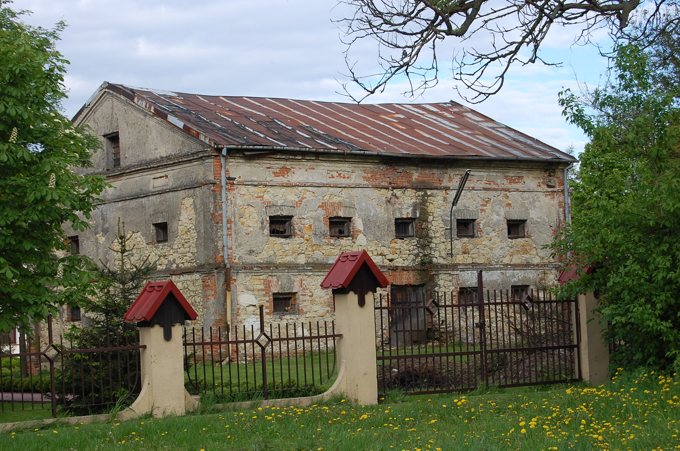 Budynek dawnego spichlerza w dzielnicy Węglin. Lublin